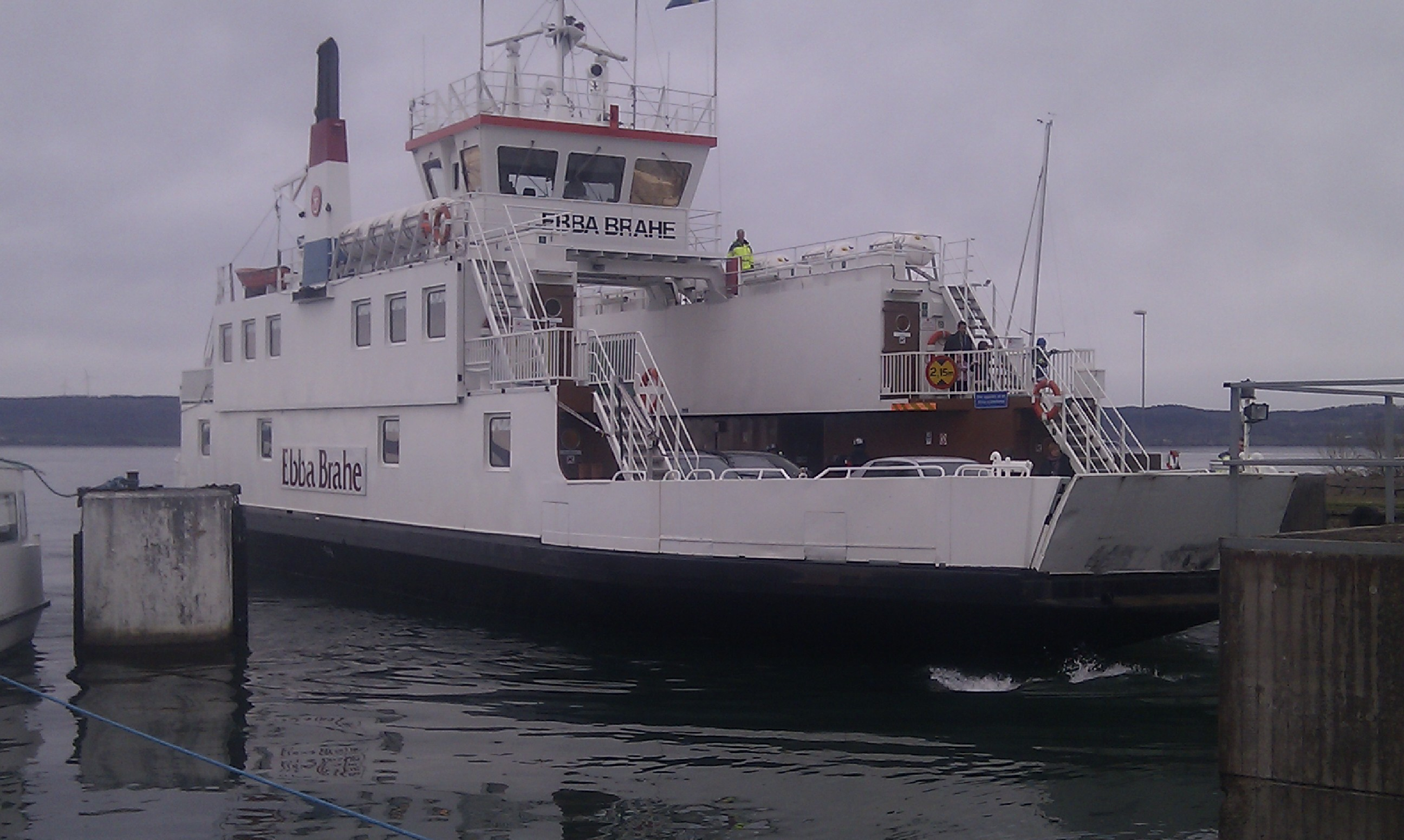 Bilfärjan Ebba Brahe, som trafikerar Visingsöleden